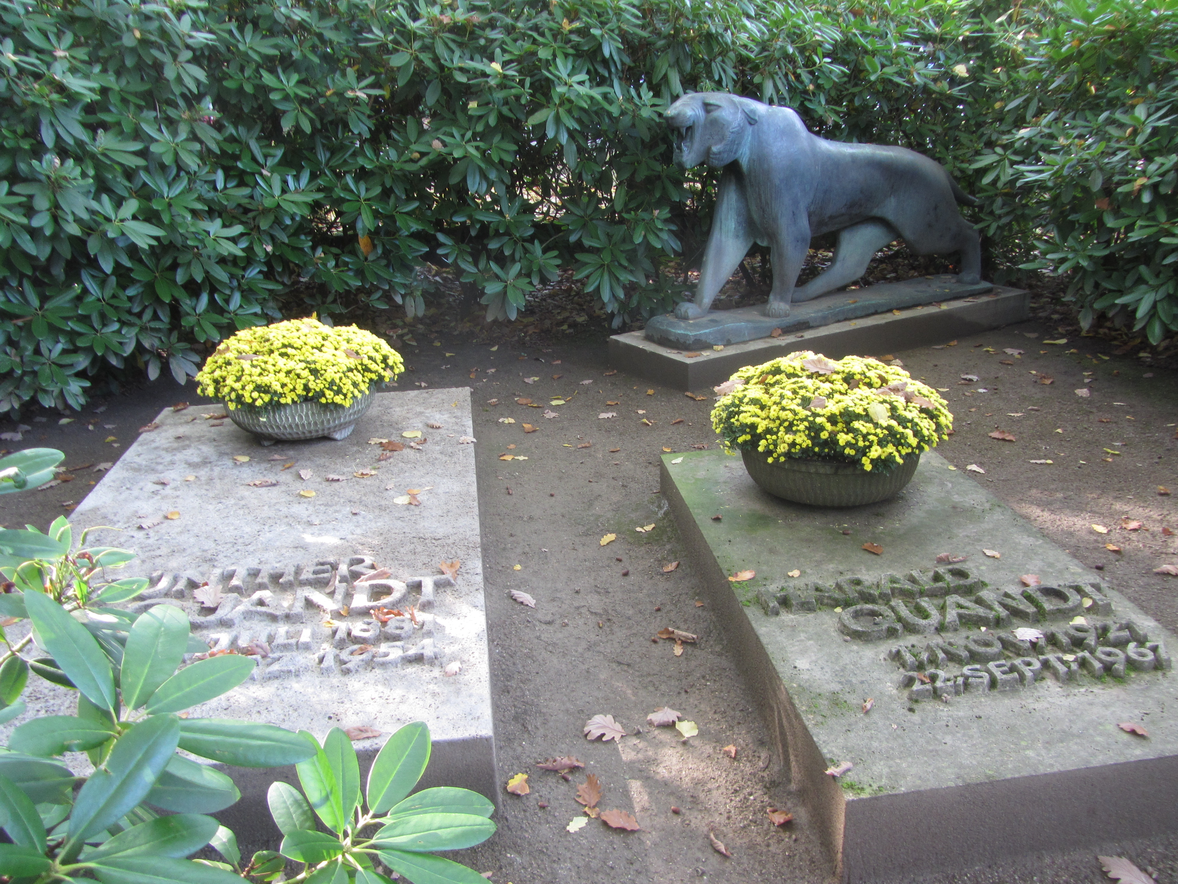 Grabplatten für Günther und Harald Quandt, mit Panther-Skulptur auf dem Waldfriedhof Bad Homburg